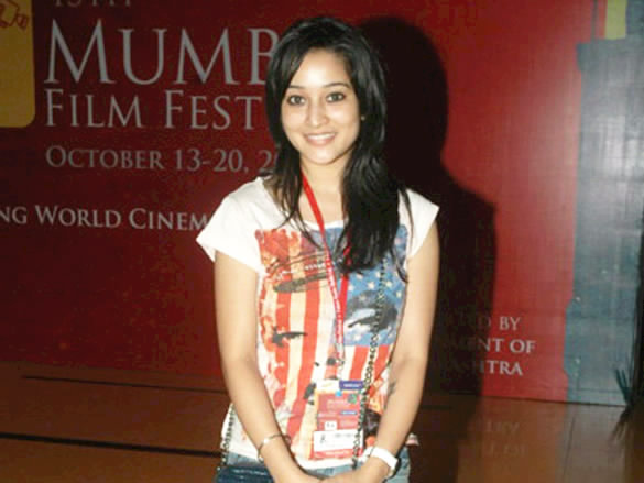 Ritu Barmecha at 13th Mumbai Film Festival - Day 7